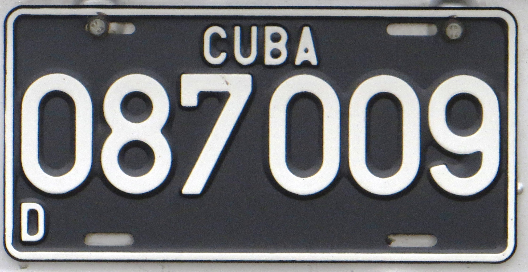 Kentekenplaat uit Cuba